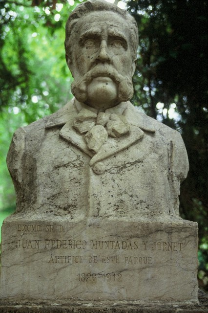 Escultura de D. Juan Federico Muntadas (1826-1912) Jornet